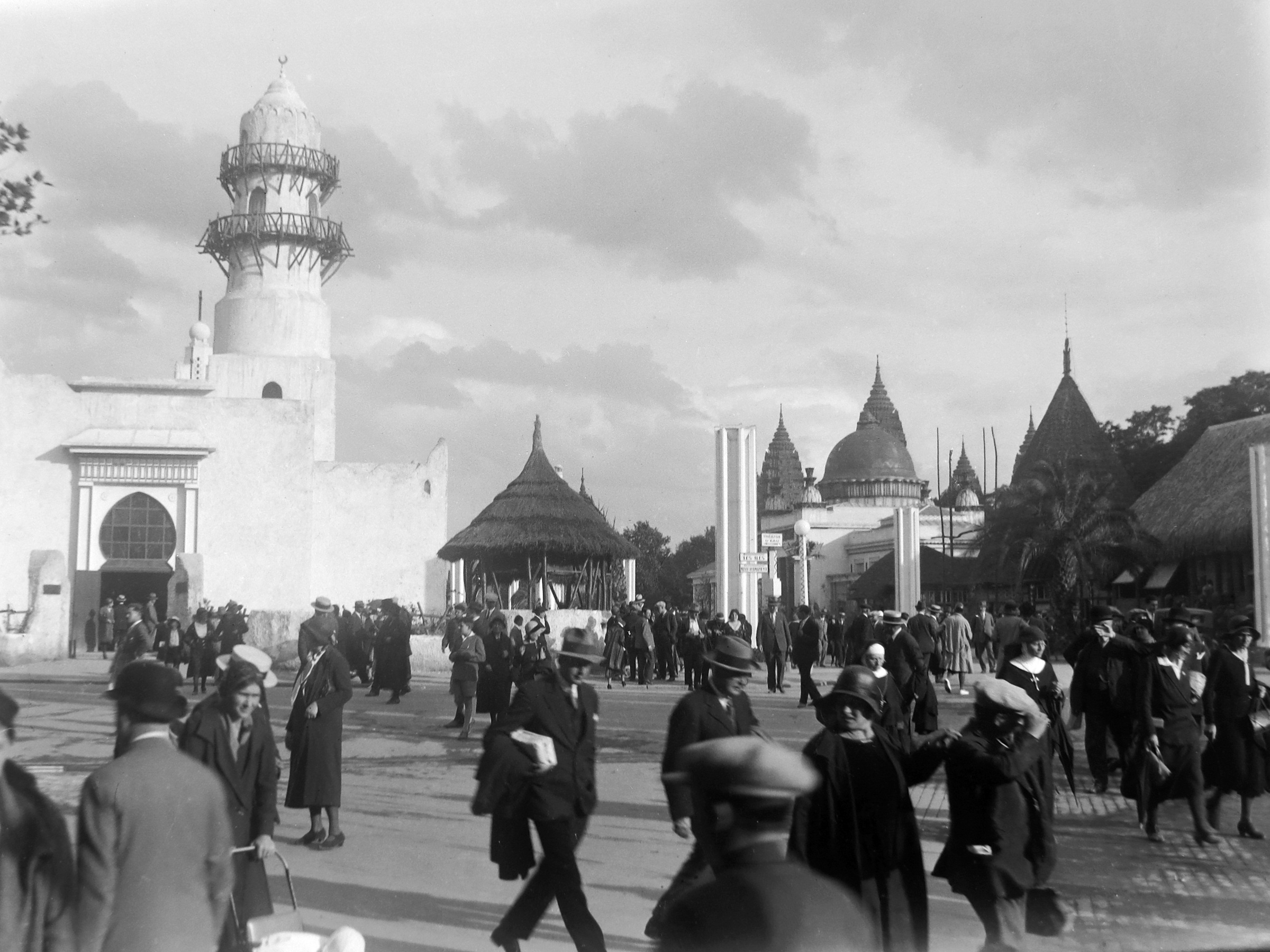 Exposition coloniale, Paris, 1931. À gauche, le pavillon de la Côte française des Somalis